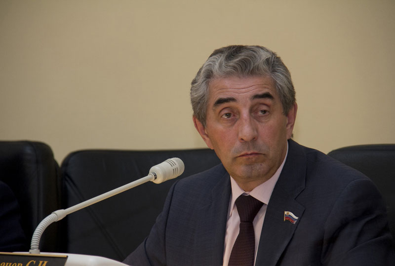 Грачев Сергей Иванович